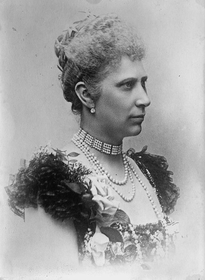 Dowager Queen of Den. (Louise)